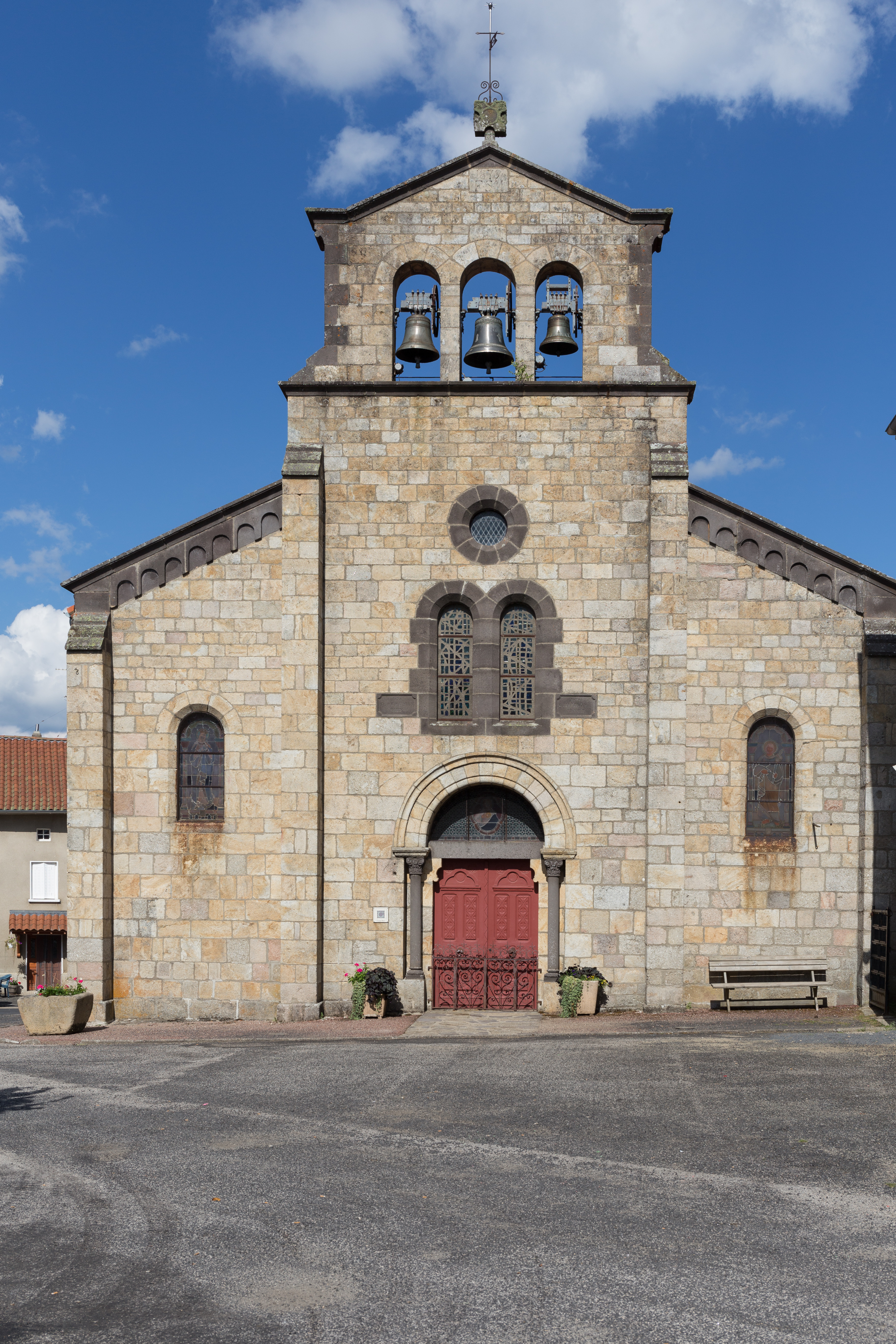 Église Saint-Pierre de Cistrières. .